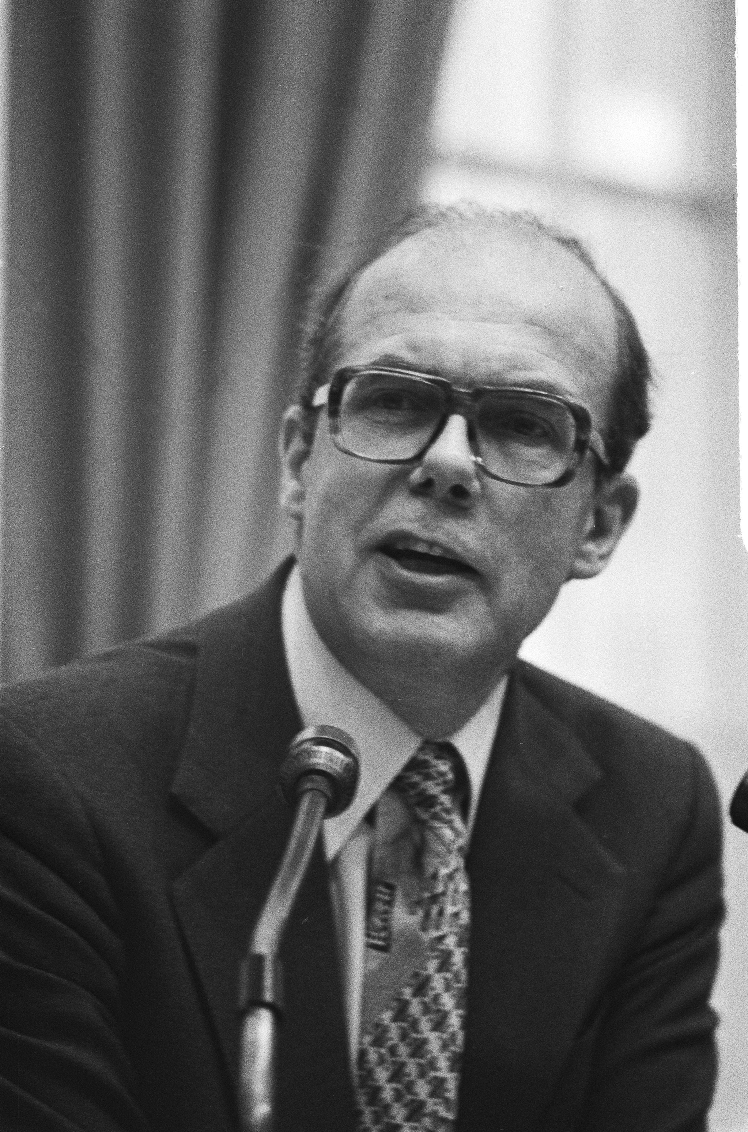 Collectie / Archief : Fotocollectie Anefo Reportage / Serie : [ onbekend ] Beschrijving : Tweede Kamer bespreekt begroting Buitenlandse Zaken; minister De Ruiter van Justitie aan het woord Datum : 8 februari 1979 Locatie : Den Haag, Zuid-Holland Trefwoorden : ministers, overheidsbegrotingen, parlementaire debatten, politiek, portretten Persoonsnaam : Ruiter, J. de Fotograaf : Bogaerts, Rob / Anefo Auteursrechthebbende : Nationaal Archief Materiaalsoort : Negatief (zwart/wit) Nummer archiefinventaris : bekijk toegang 2.24.01.05 Bestanddeelnummer : 930-1137